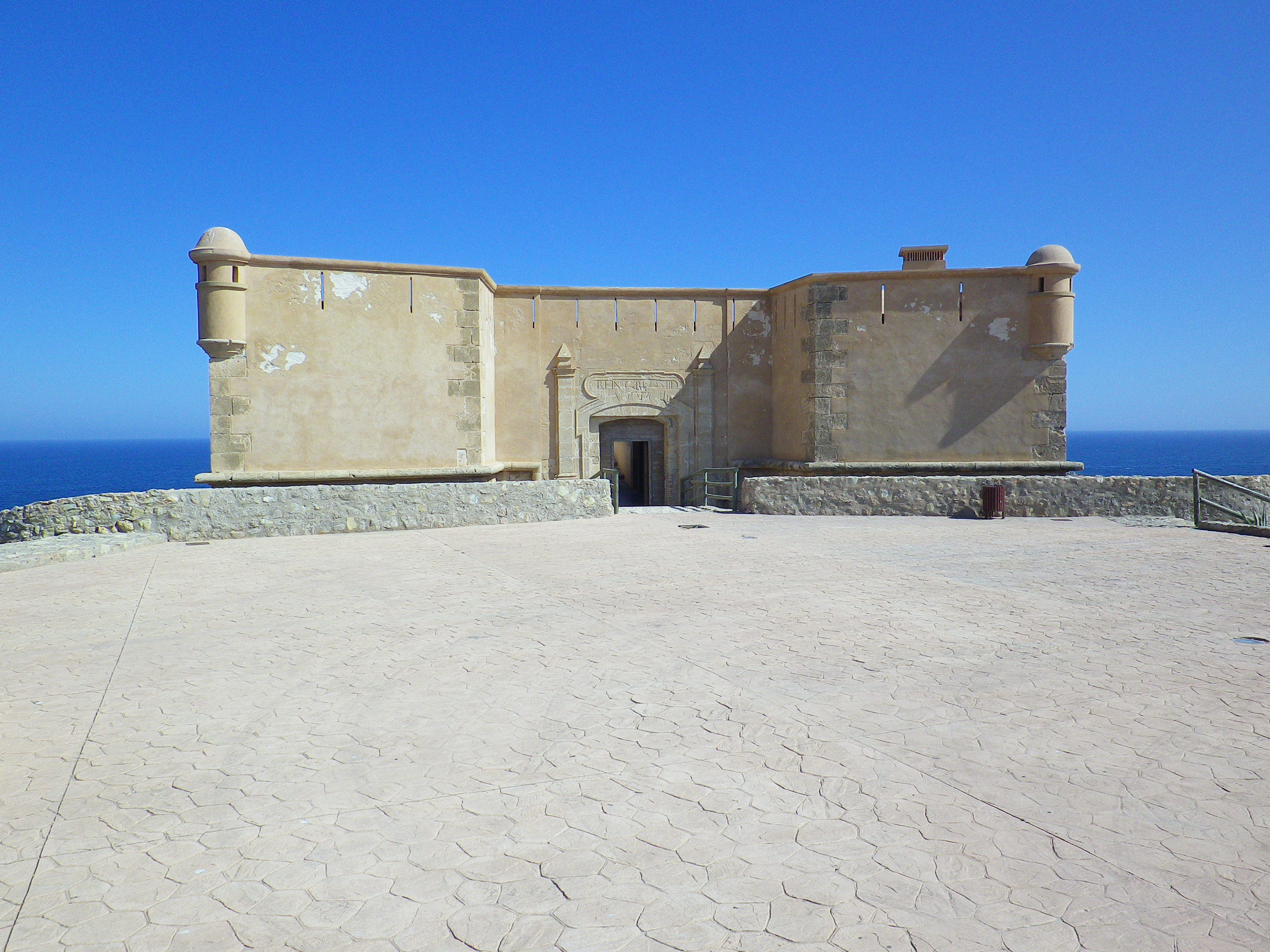 Fotografía del Castillo de San Juan de los Terreros, municipio de Pulpí, provincia de Almería, Andalucía, España.